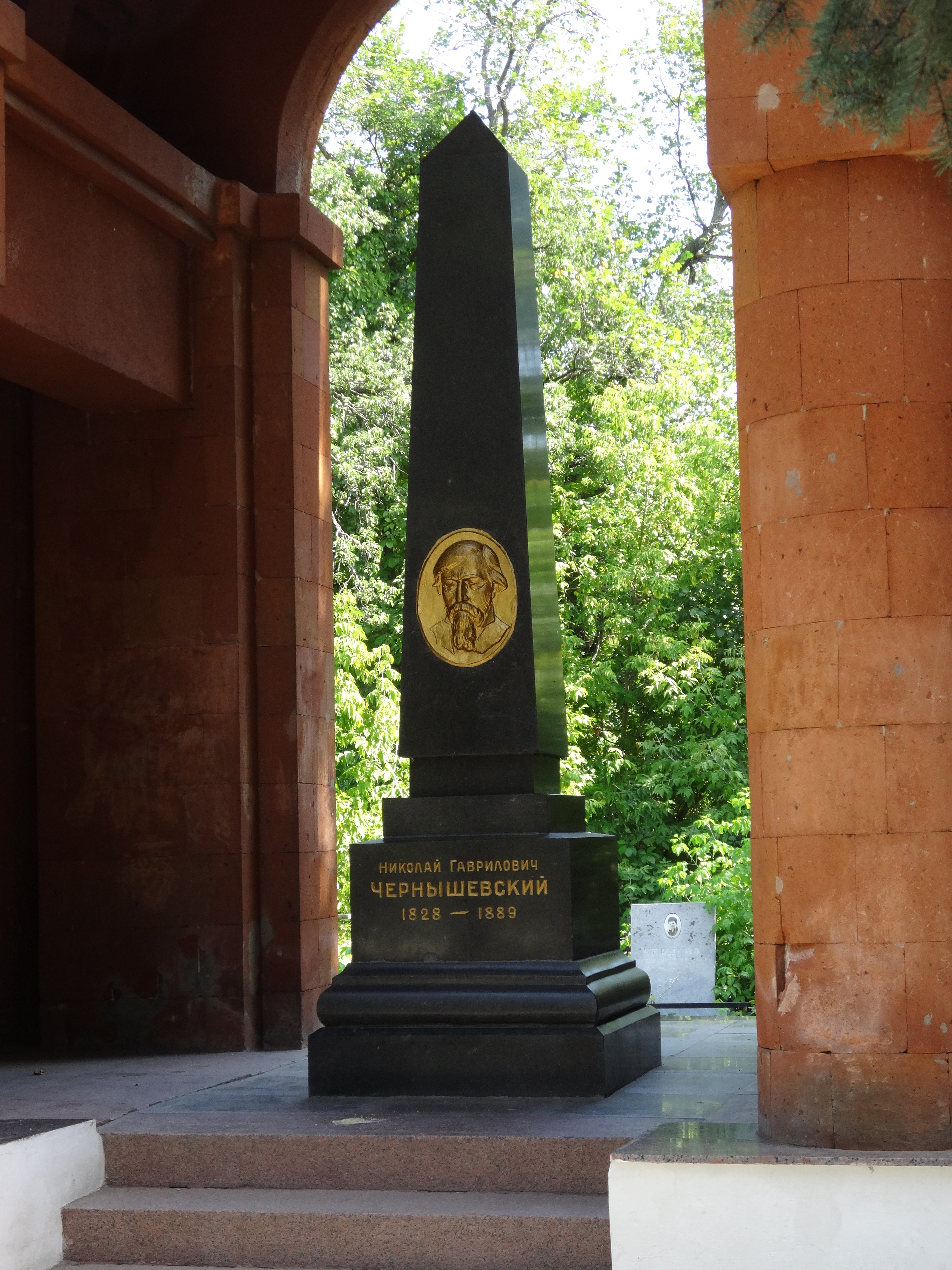 Могила Чернышевского Н.Г. (1828-1889), писателя и философа: Воскресенское кладбище, Саратов, Саратовская область